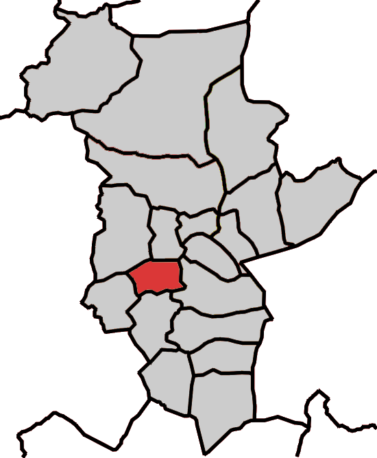 Situación da parroquia de As Goás no concello de Abadín